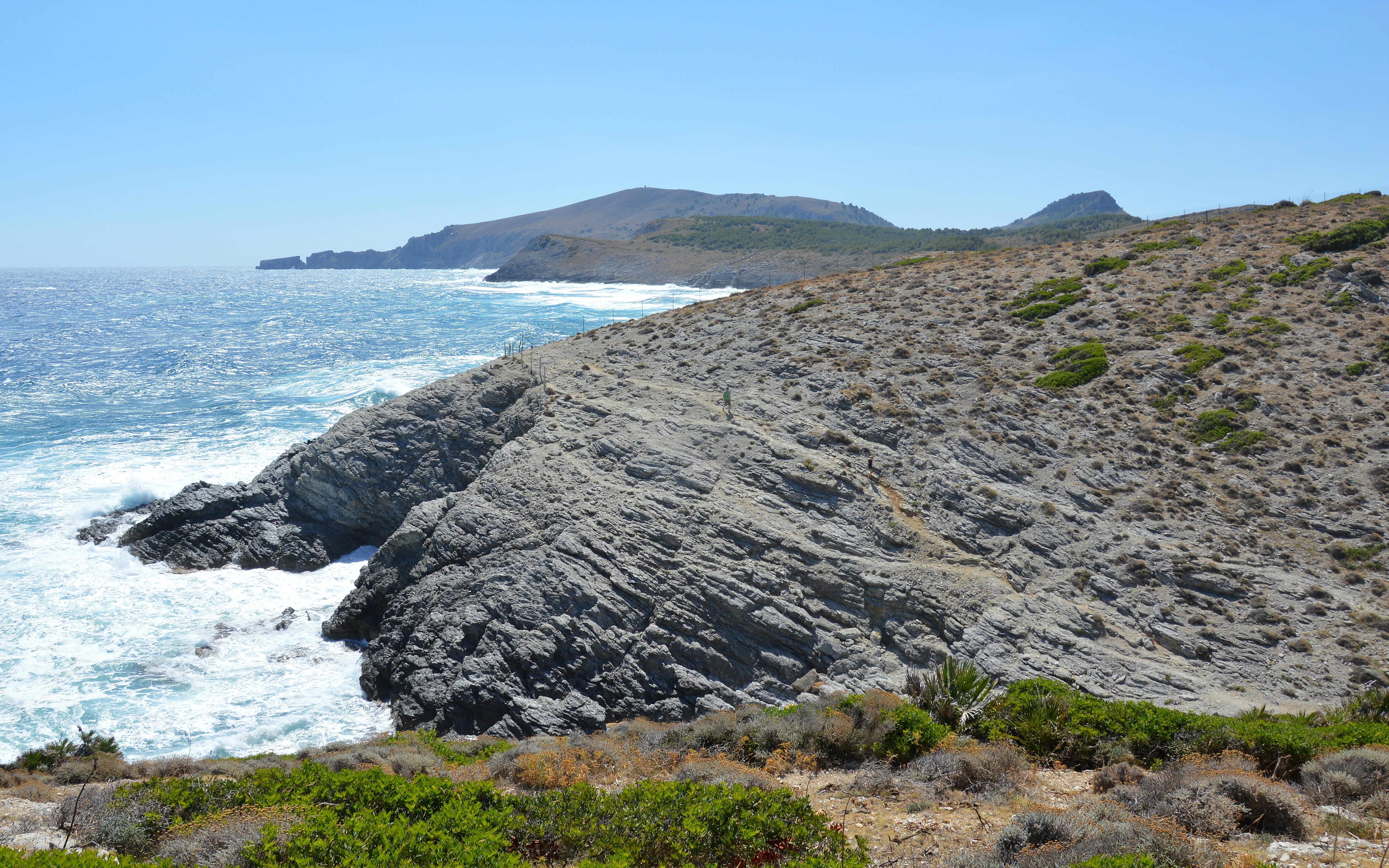 Wanderer auf dem Cami del Carabiners